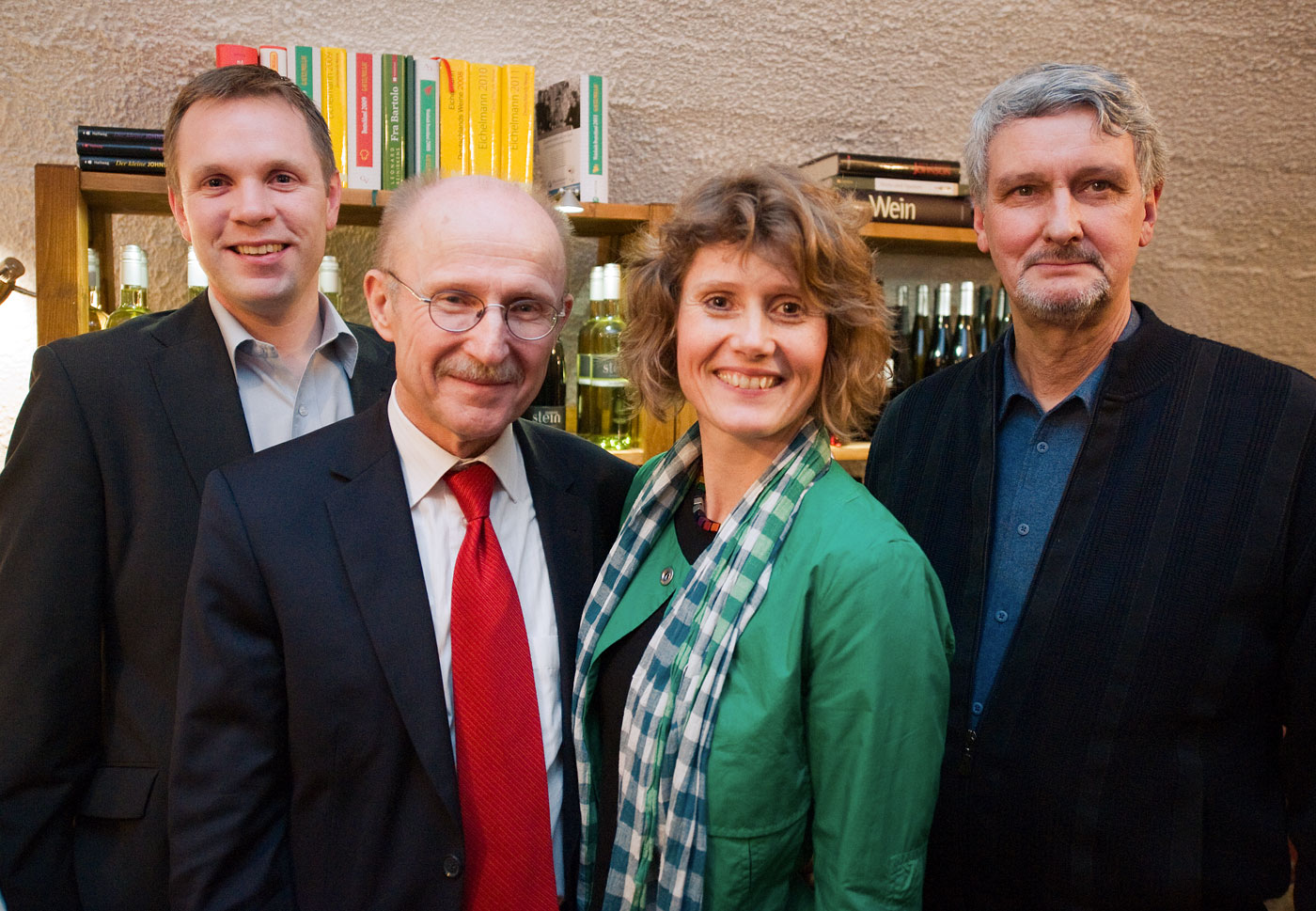 Willi Lemke (2. von links), UN-Sonderberater für Sport, mit seiner Nichte Eveline Lemke, Sprecherin von Bündnis 90/Die Grünen Rheinland-Pfalz, Nils Wiechmann (links) und Michael Musil bei einem Empfang in Koblenz